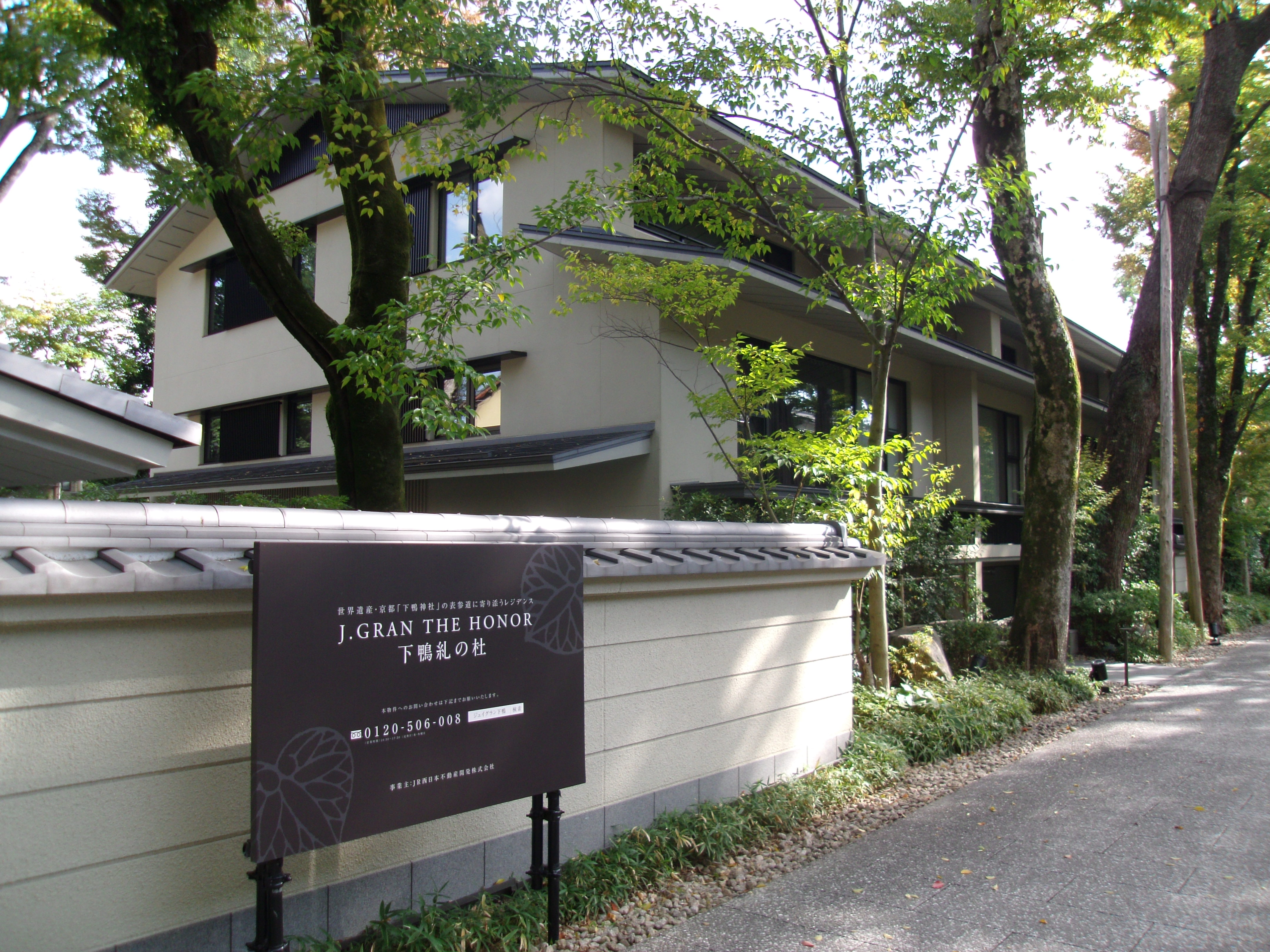 世界遺産・下鴨神社糺の森内に建てられ問題となったマンションのJ.GRAN THE HONOR 下鴨糺の杜